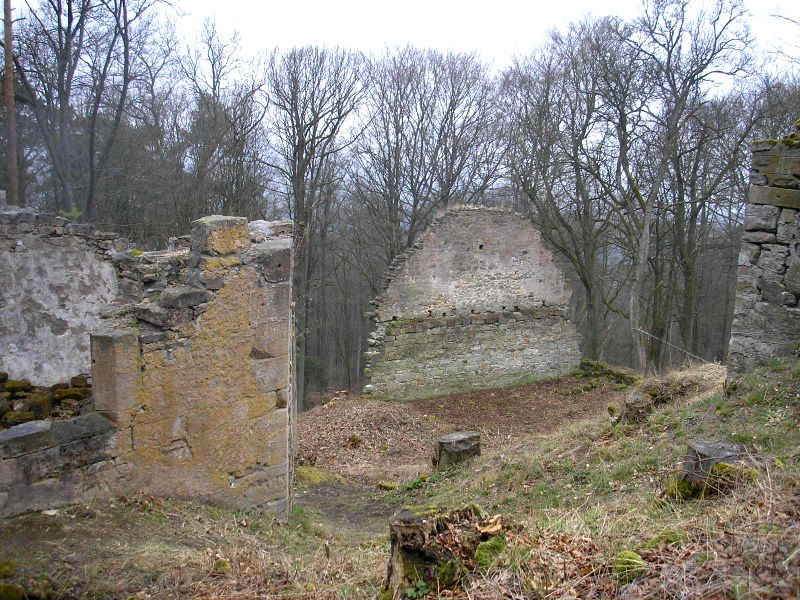 Burg Rauheneck (Raueneck) bei Ebern (Unterfranken). Kapelle (links) und Unterburg mit der Giebelwand der ehemaligen Scheune.